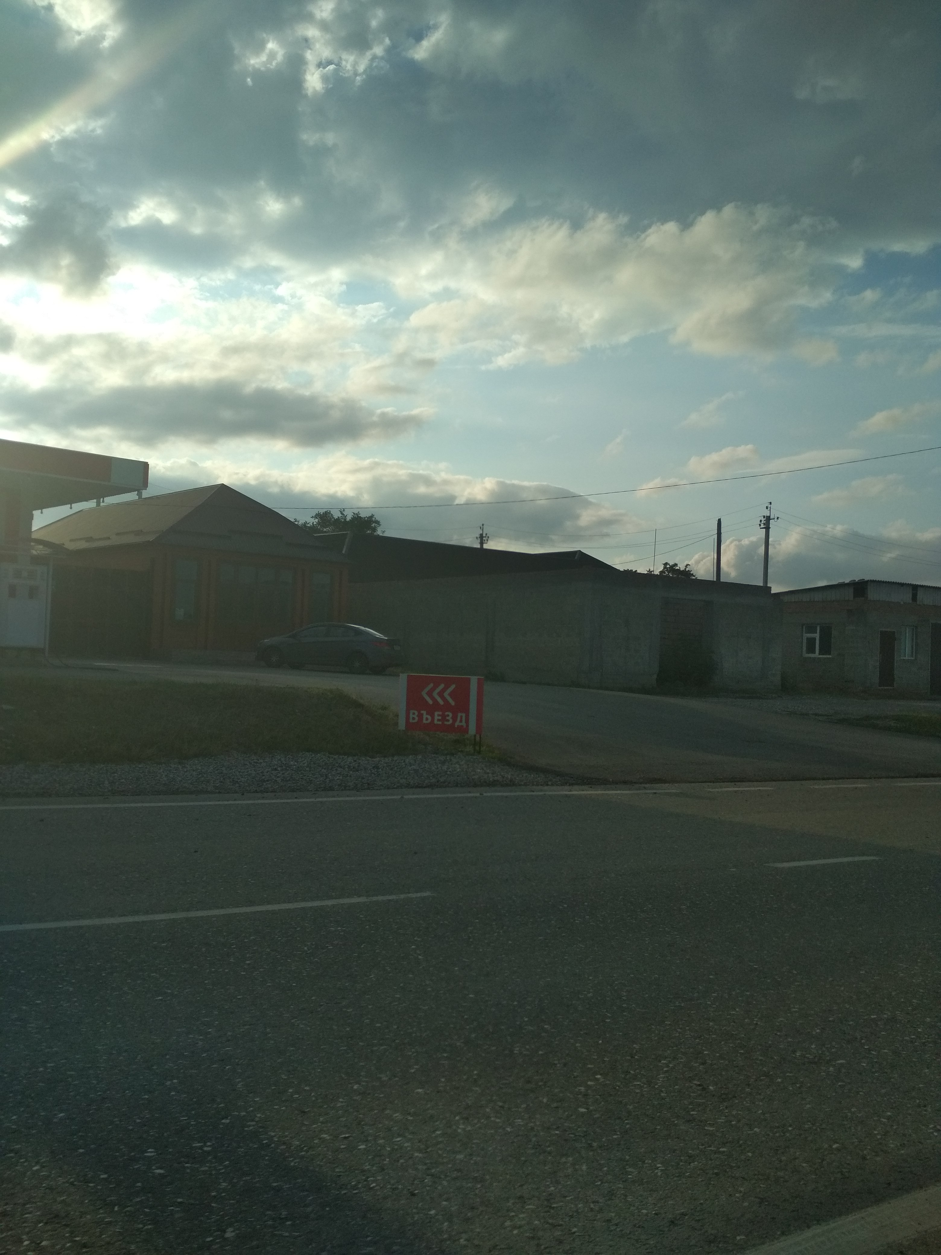 Нохчийн: Лаха Варанда